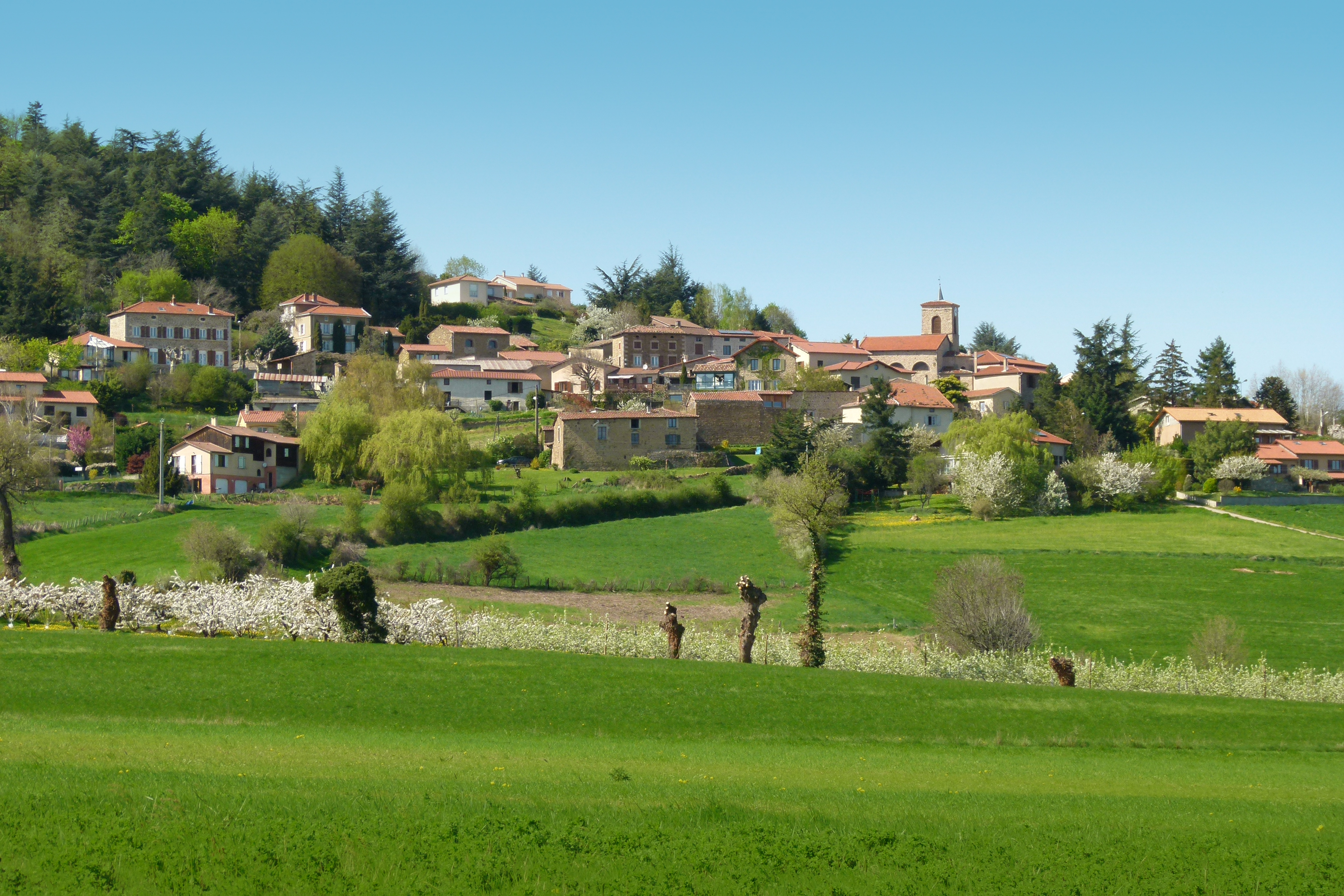 vue du village en avril 2011